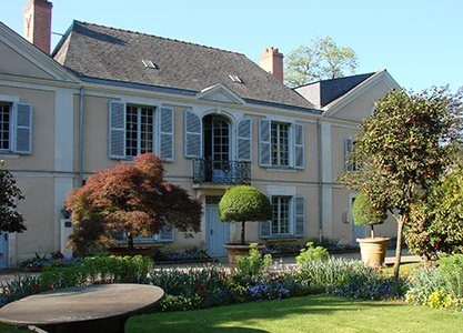 Maison Allard, Muséum des sciences naturelles d'Angers (Maine-et-Loire, France), 2017.